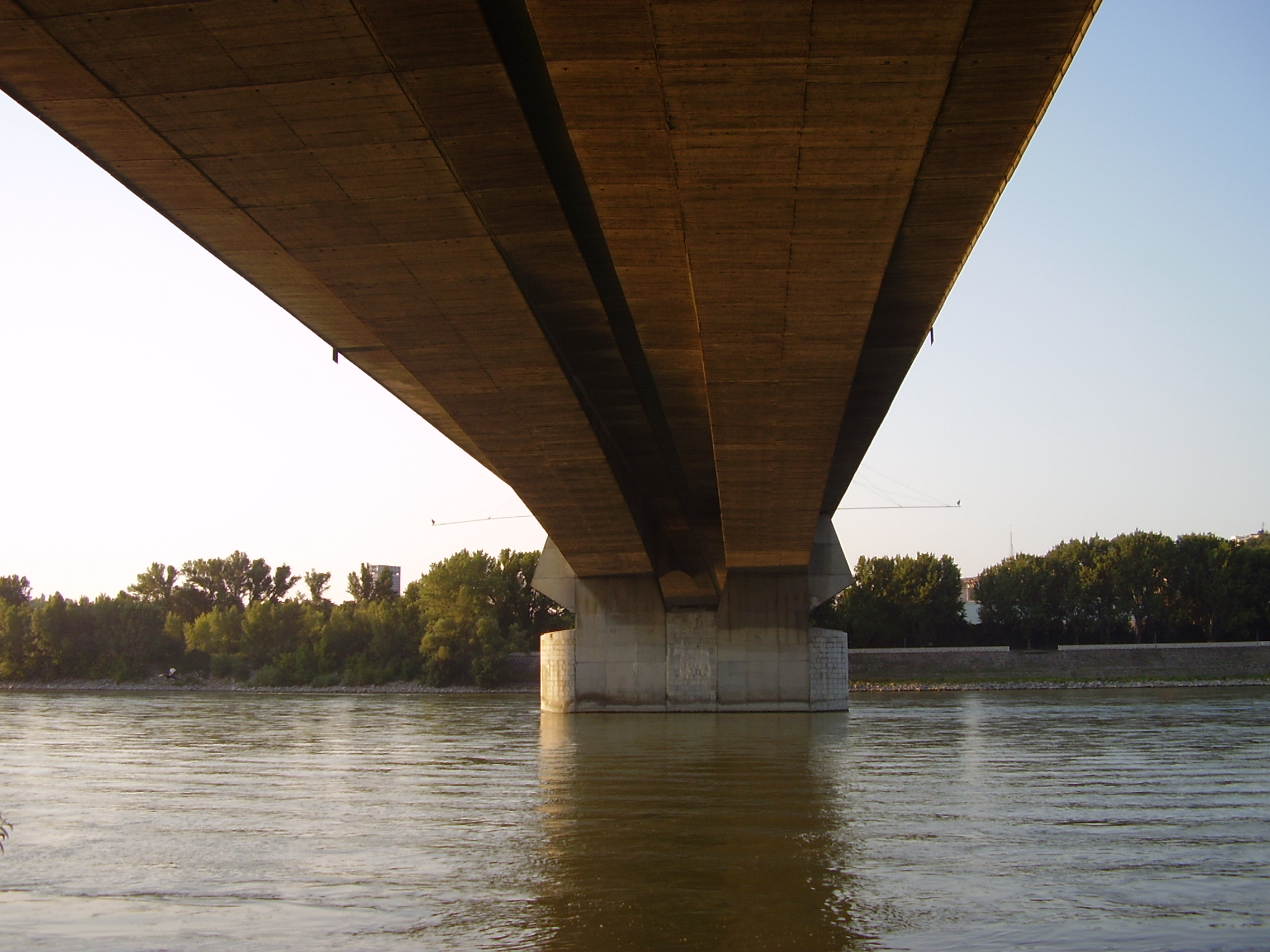 Bratislava